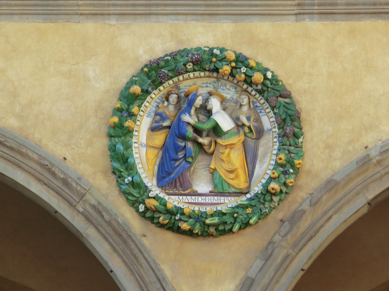 Ospedale del Ceppo, Pistoia, Italy